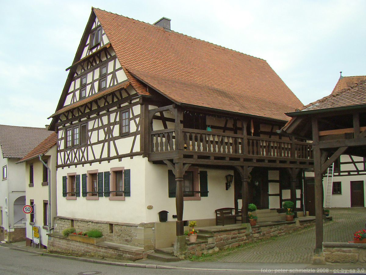 Historisches Fachwerkhaus in Kraichtal-Landshausen